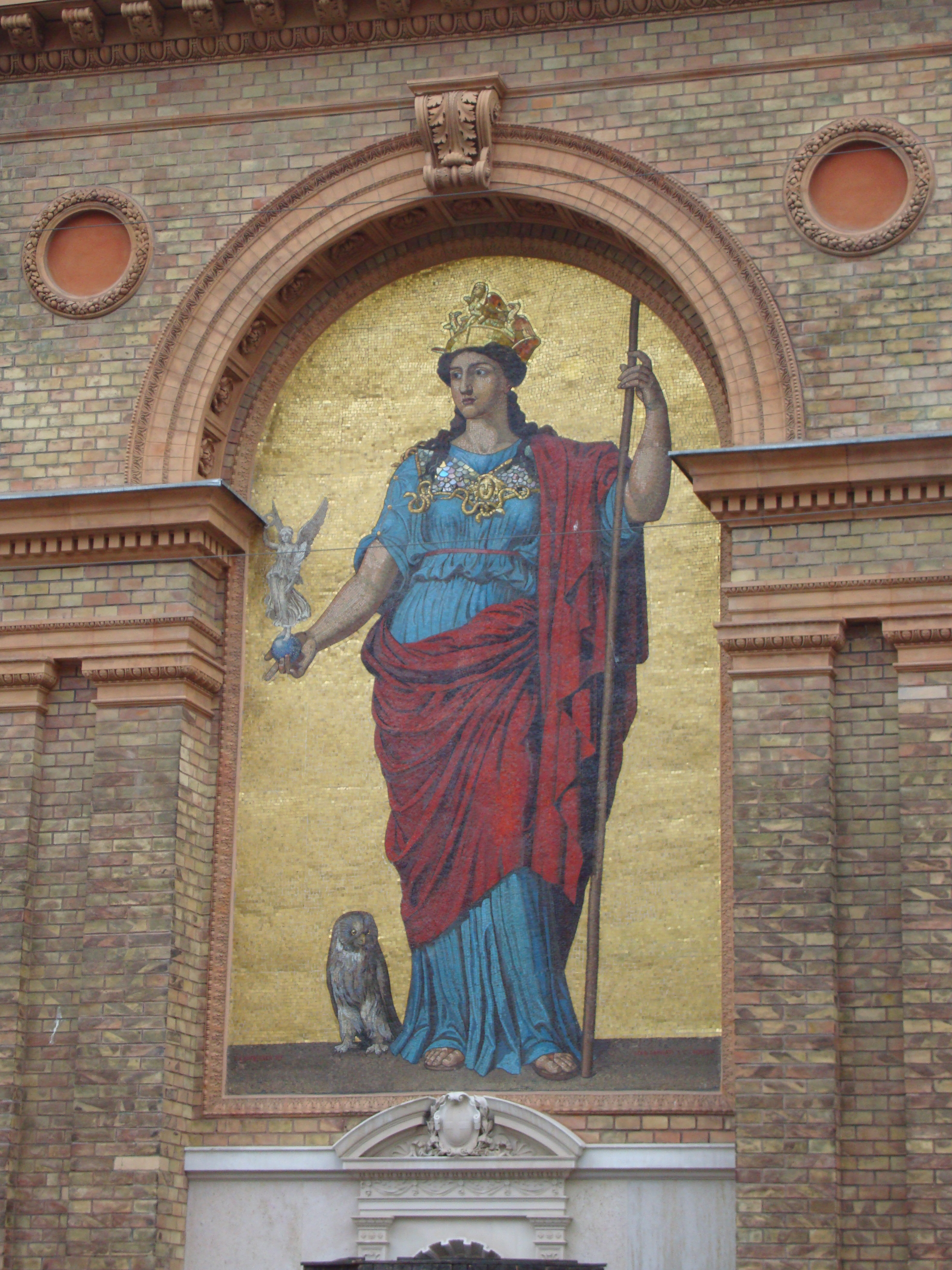 AngewandteWien